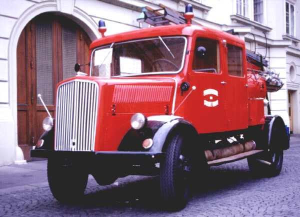 historisches Löschfahrzeug der Wiener Berufsfeuerwehr.